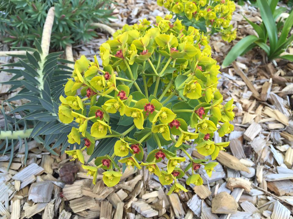 Euphorbia myrsinites cultivar Washfield